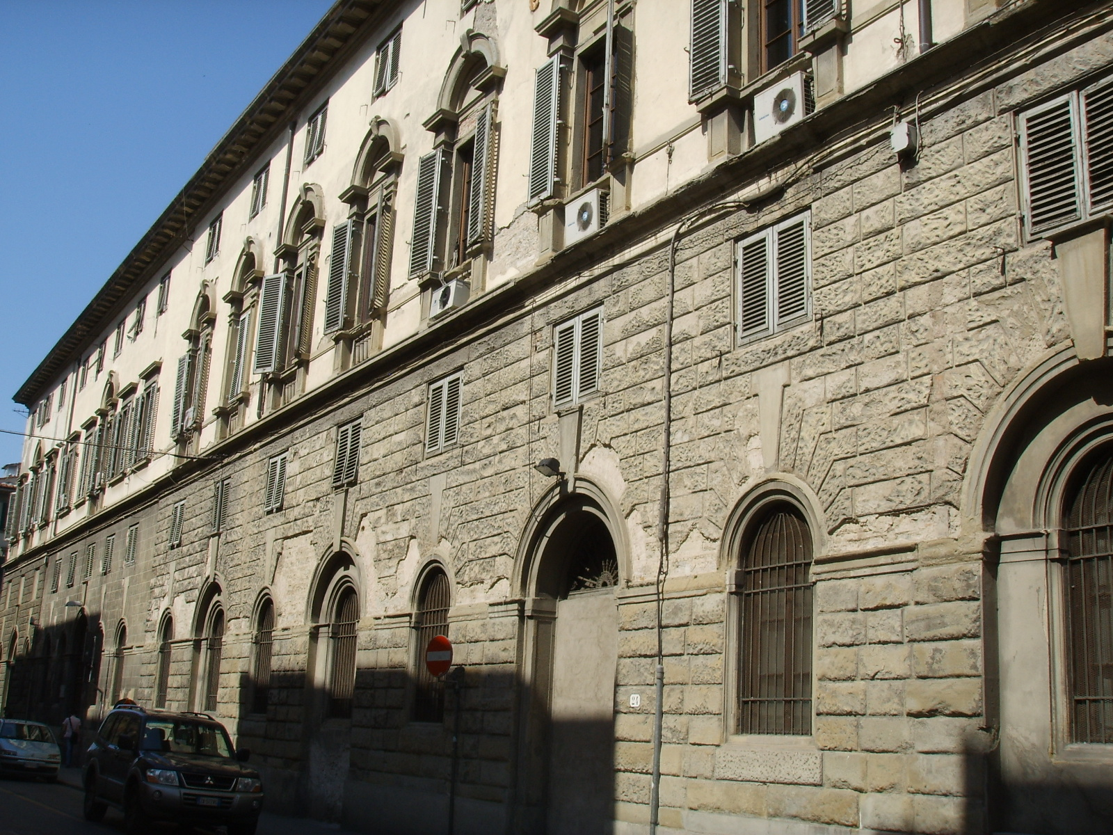 Caserma_della_Scuola_allievi_ufficiali_dei_Carabinieri,_Firenze in Florence